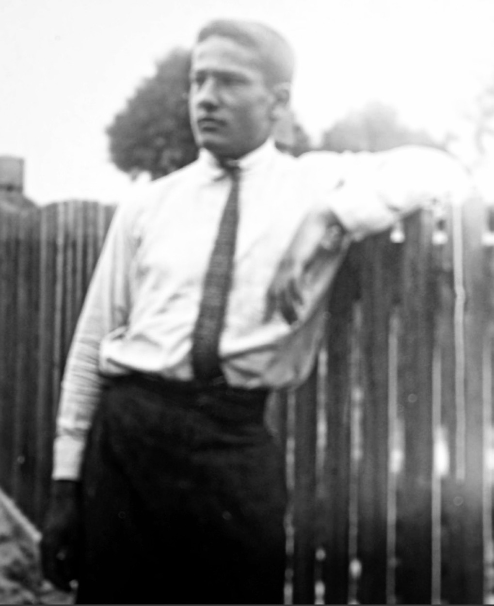 Laurence Karl Johann Feininger (1909–1976), später Musikwissenschaftler, während der „Sommerfrische“ im Ostseebad Deep (heute: Mrzeżyno) bei Kolberg in Pommern, wo die Familie ab 1925 die Sommer verlebte. Die Bildrückseite wurde von Hand beschriftet: „Deep. Laurence, ar. 1925 [?], 1926“